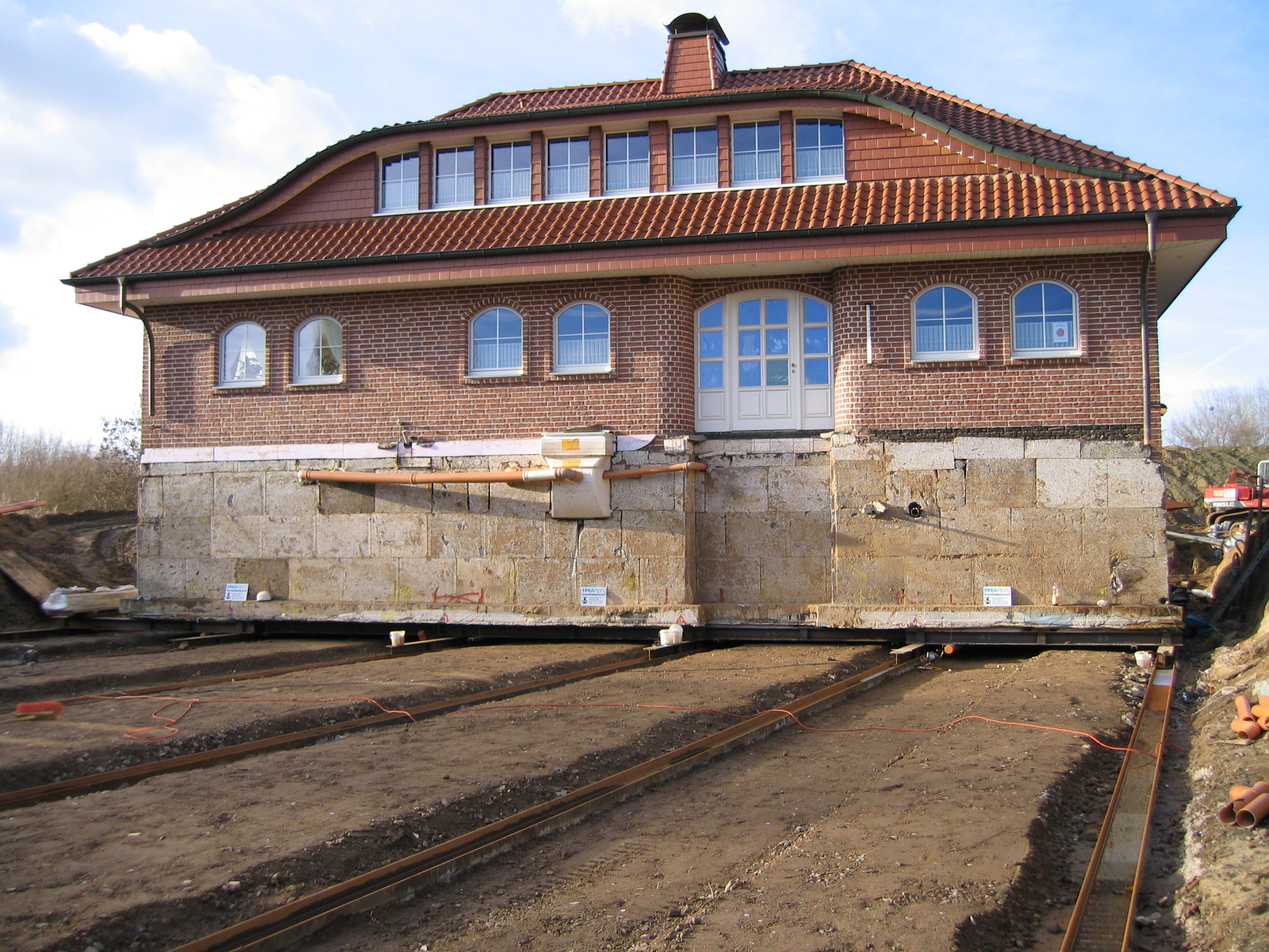 Ende 2003 wurde in Bad Oeynhausen ein Wohnhaus um knapp 30 Meter verschoben. Zum Einsatz kam dabei das patentierte ERKA-Pfahl-System.